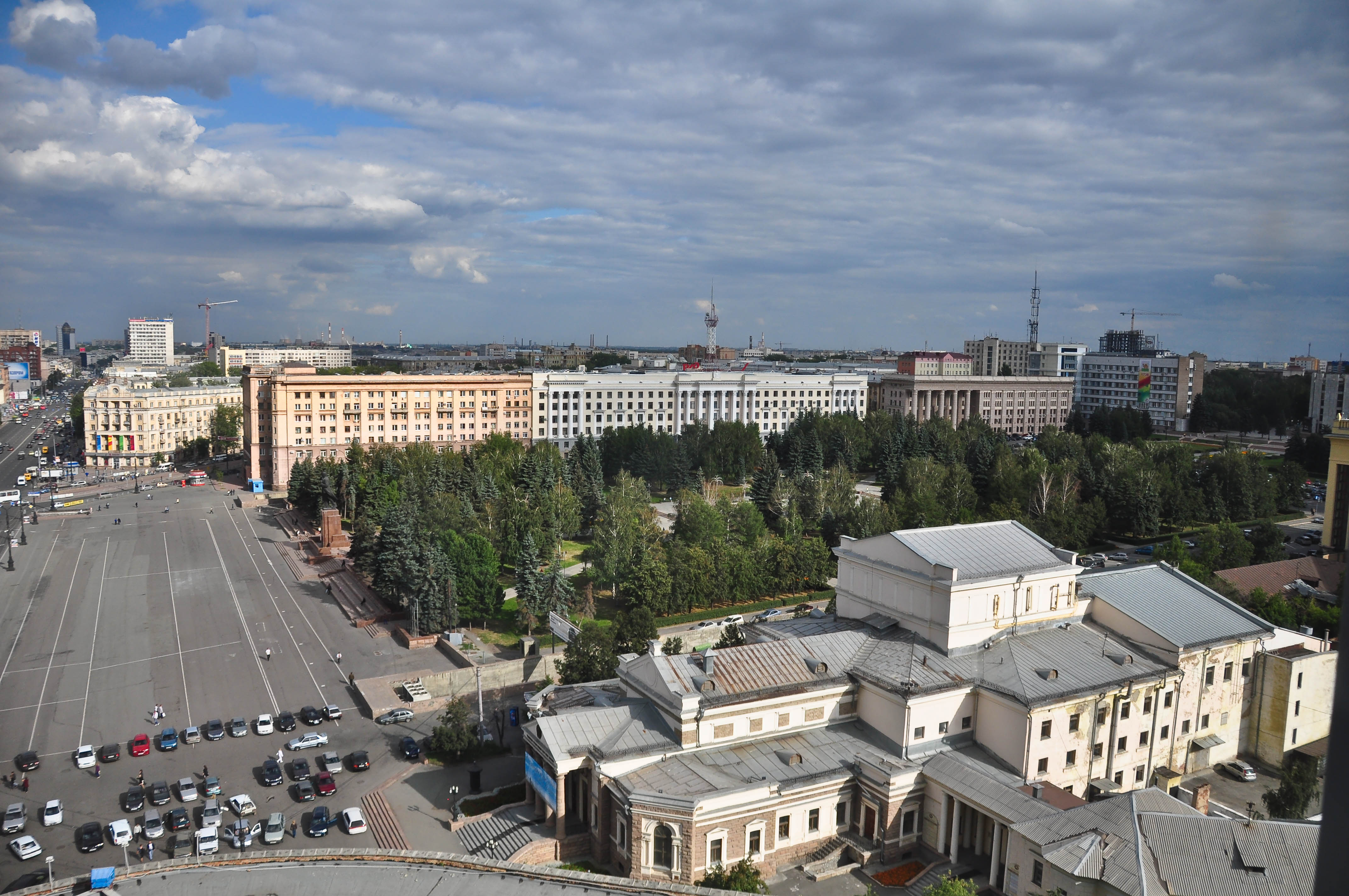 Площадь Революции (вид с ОЦ "Бизнес-Урал")